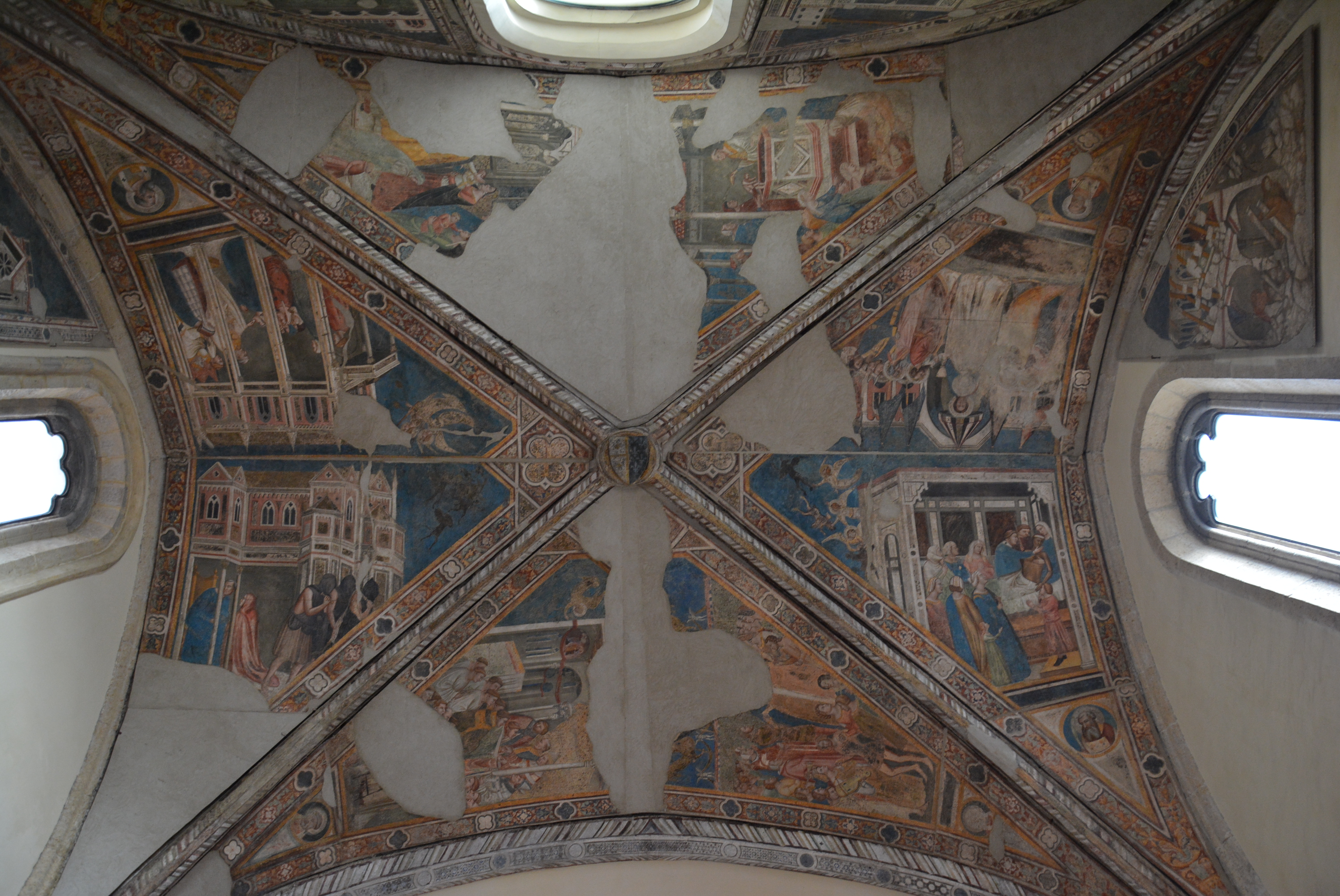 Chiesa di Santa Maria Incoronata a Napoli